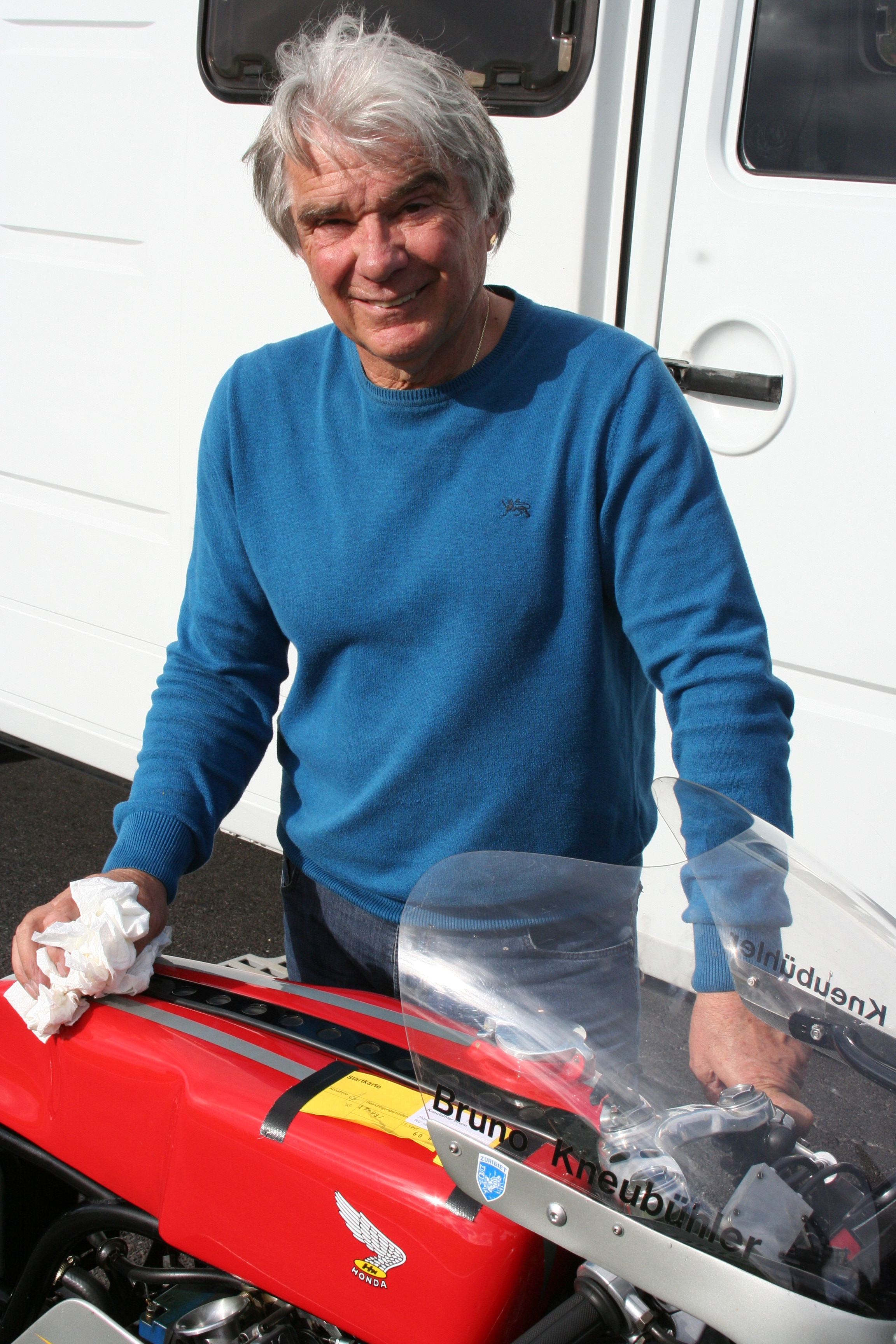 Bruno Kneubühler beim Oldtimer Grand Prix in Schwanenstadt, Oberösterreich, am 18. September 2016